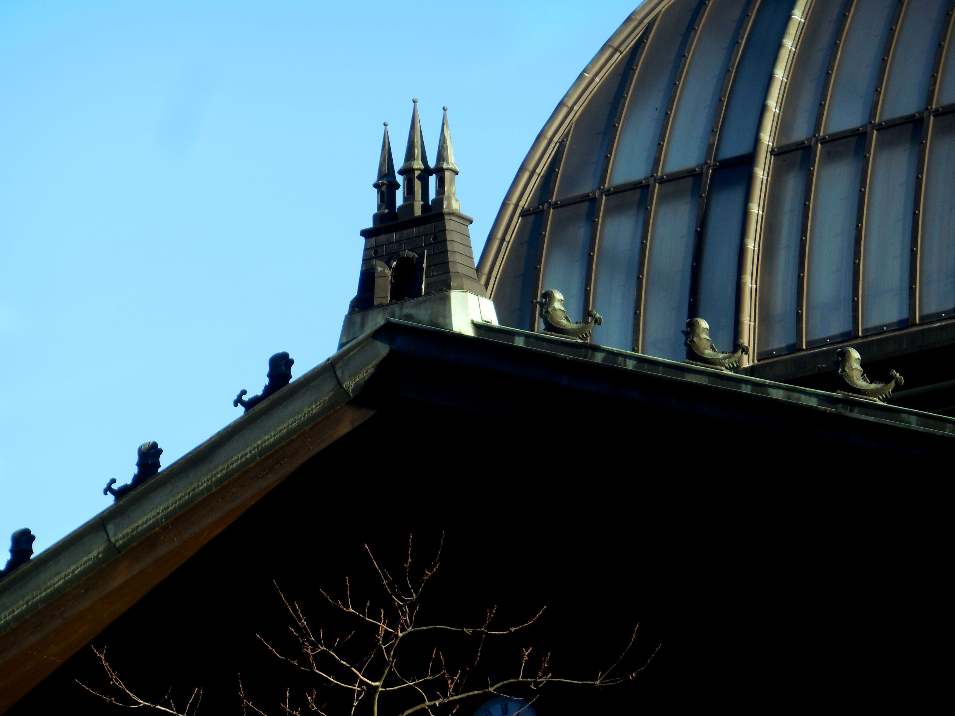 Wappensymbol von Altona als Skulptur (Fischauktionshalle)